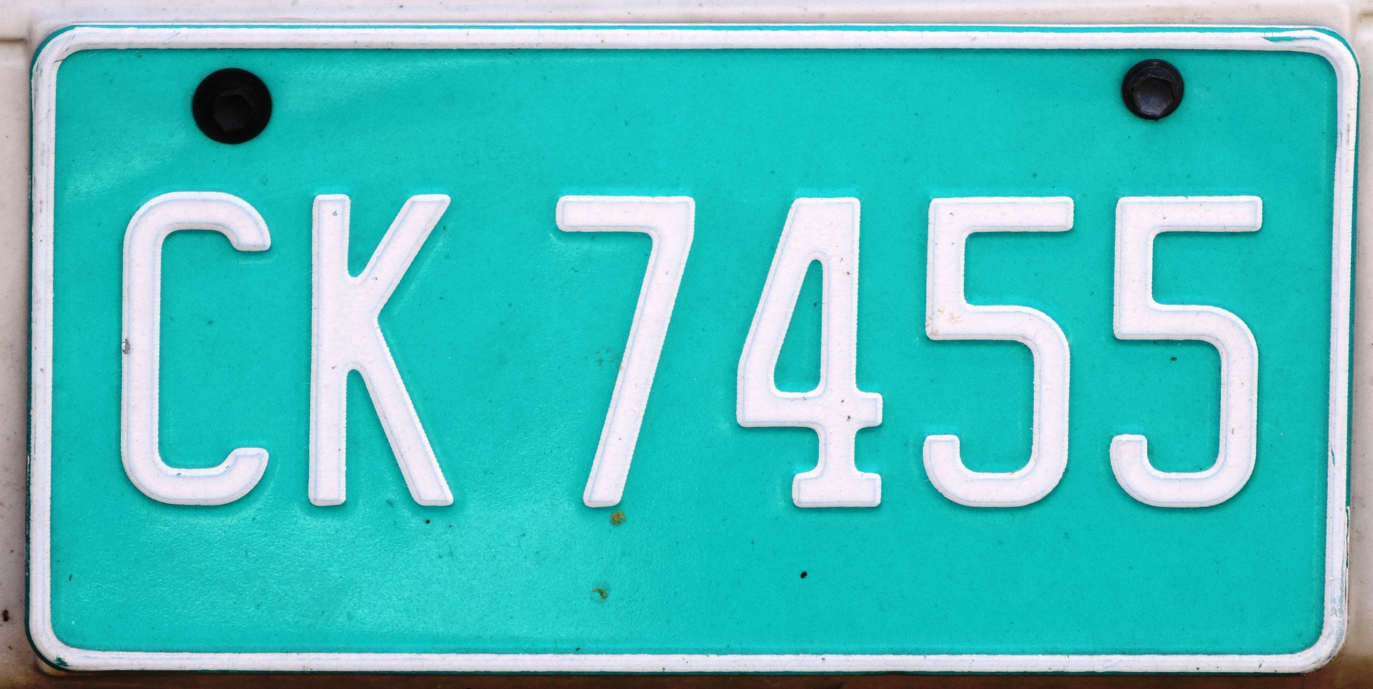 Jamaica kentekenplaat vrachtauto's